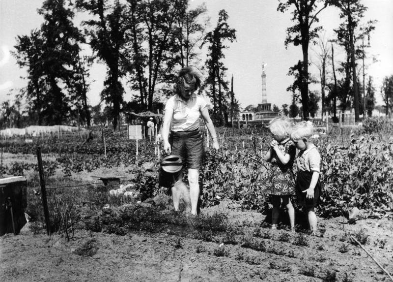 Berlin-Tiergarten, Gemüsebeet wird gegossen Zentralbild/Dreyer,Berlin 1945-46. Die Bäume des Tiergartens sind zum größten Teil durch Kriegseinwirkung zerstört, ein kleiner Rest ist gefällt und verheizt worden. Die Freiflächen sind aufgeteilt und werden als zusätzliche Nahrungsquelle genutzt.